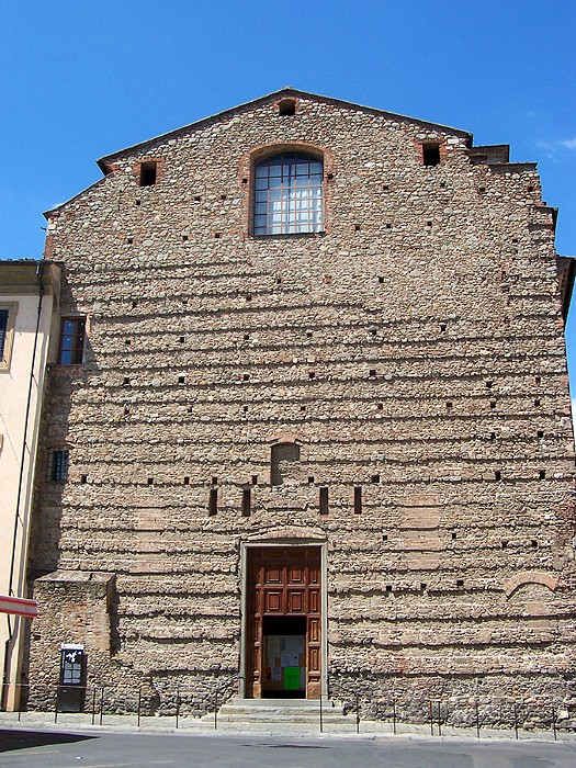 Pistoia - Chiesa dello Spirito Santo